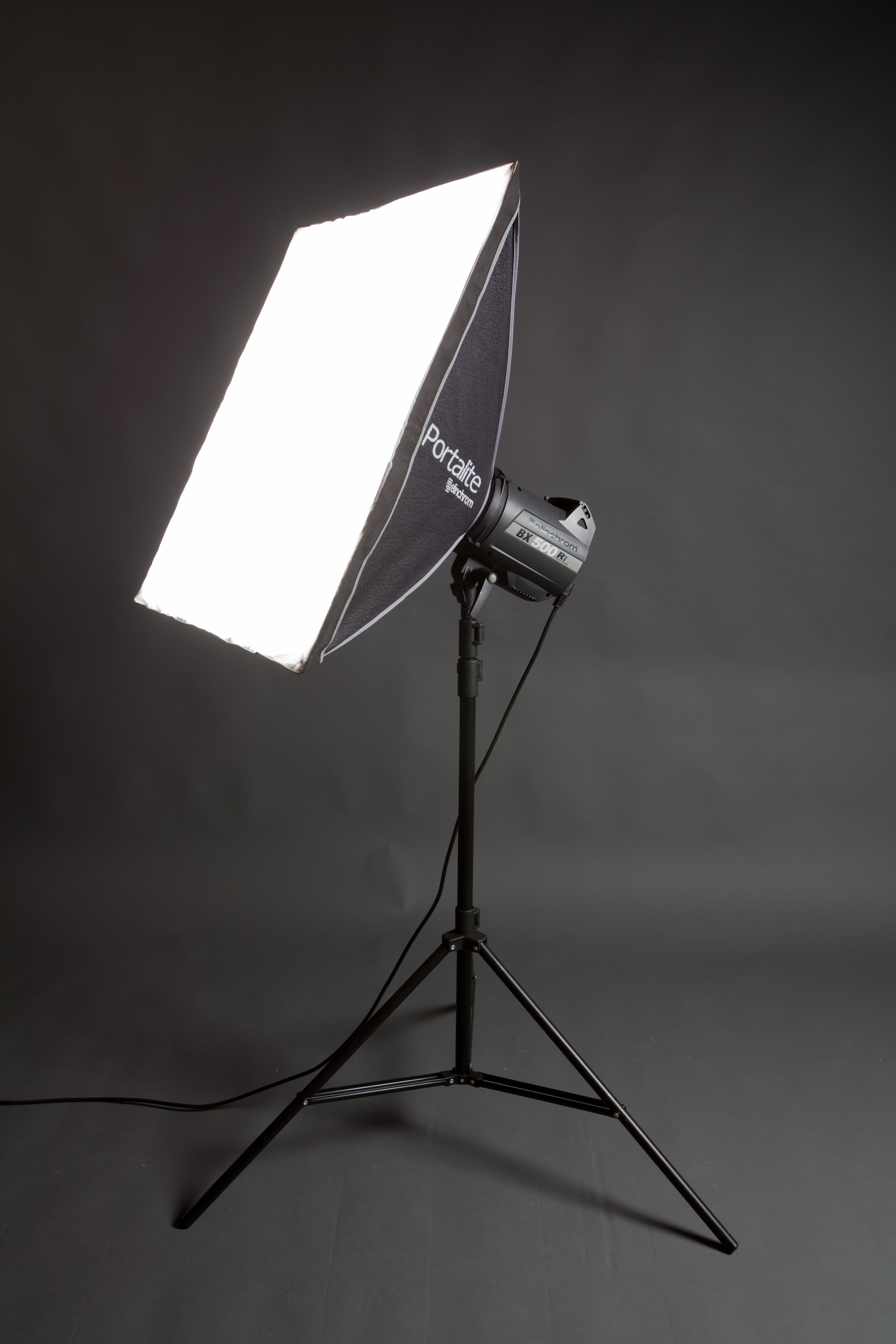 Elinchrom BX500Ri mit Softbox vor grauem Hintergrund.